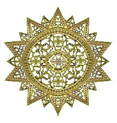 Ster van de Orde van de Ster